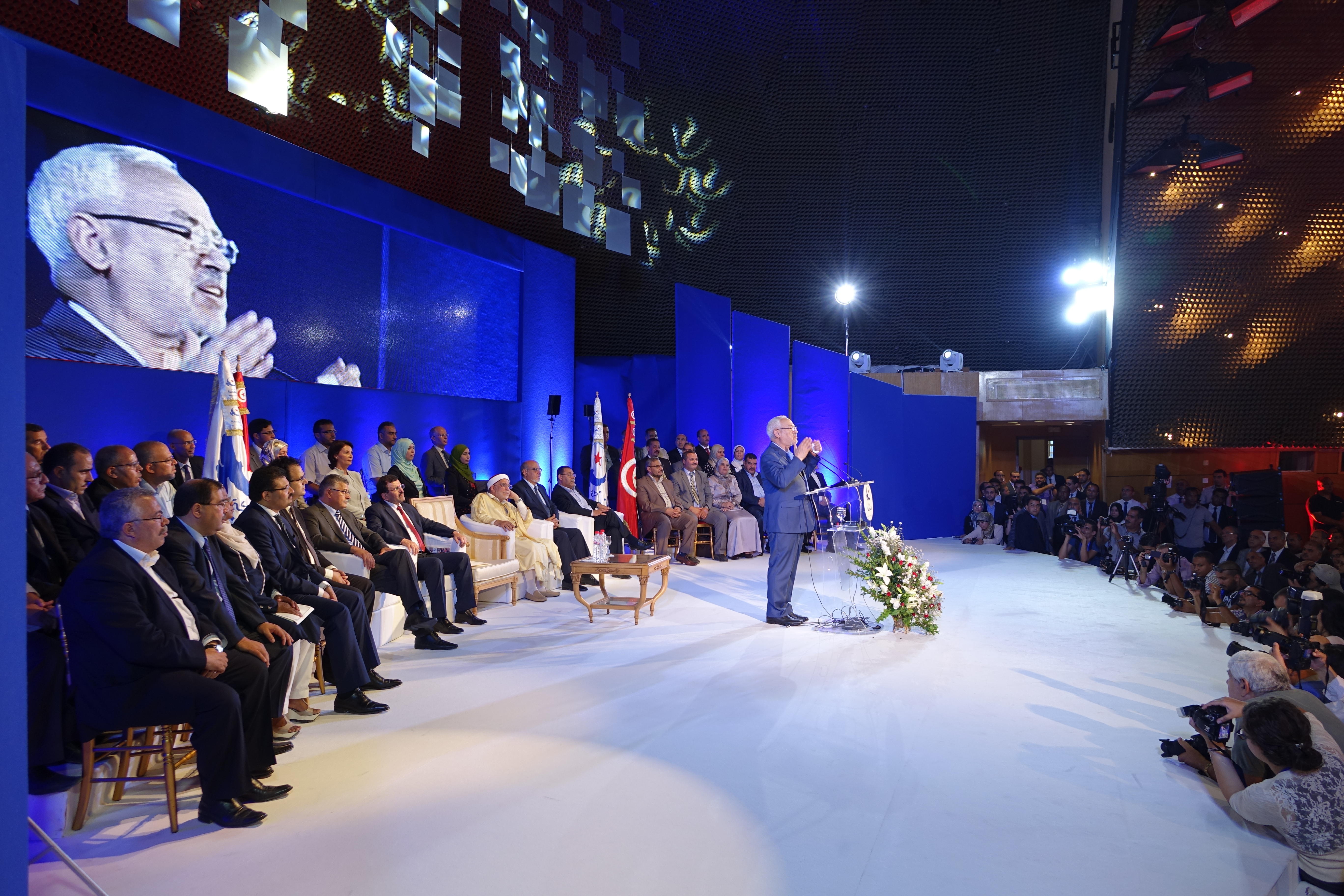 صور ندوة حركة النهضة للإعلان عن برنامجها الاقتصادي والاجتماعي أثناء ندوة حركة النهضة التونسية للإعلان عن برنامجها الاقتصادي والاجتماعي للانتخابات التشريعية التونسية 2014 في 23 سبتمبر 2014. Pendant la réunion du mouvement Ennahdha en Tunisie pour annoncer son programme économique et sociale pour les élections législatives tunisiennes en 2014, le 23 Septembre 2014.